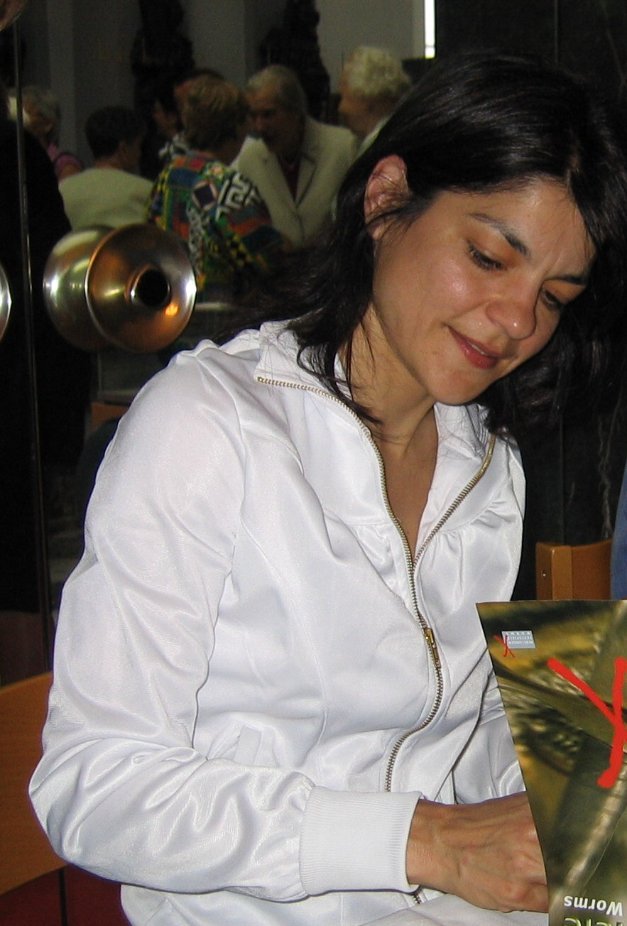 Jasmin Tabatabai schreibt Autogramme im Wormser Kunsthaus Heylshof